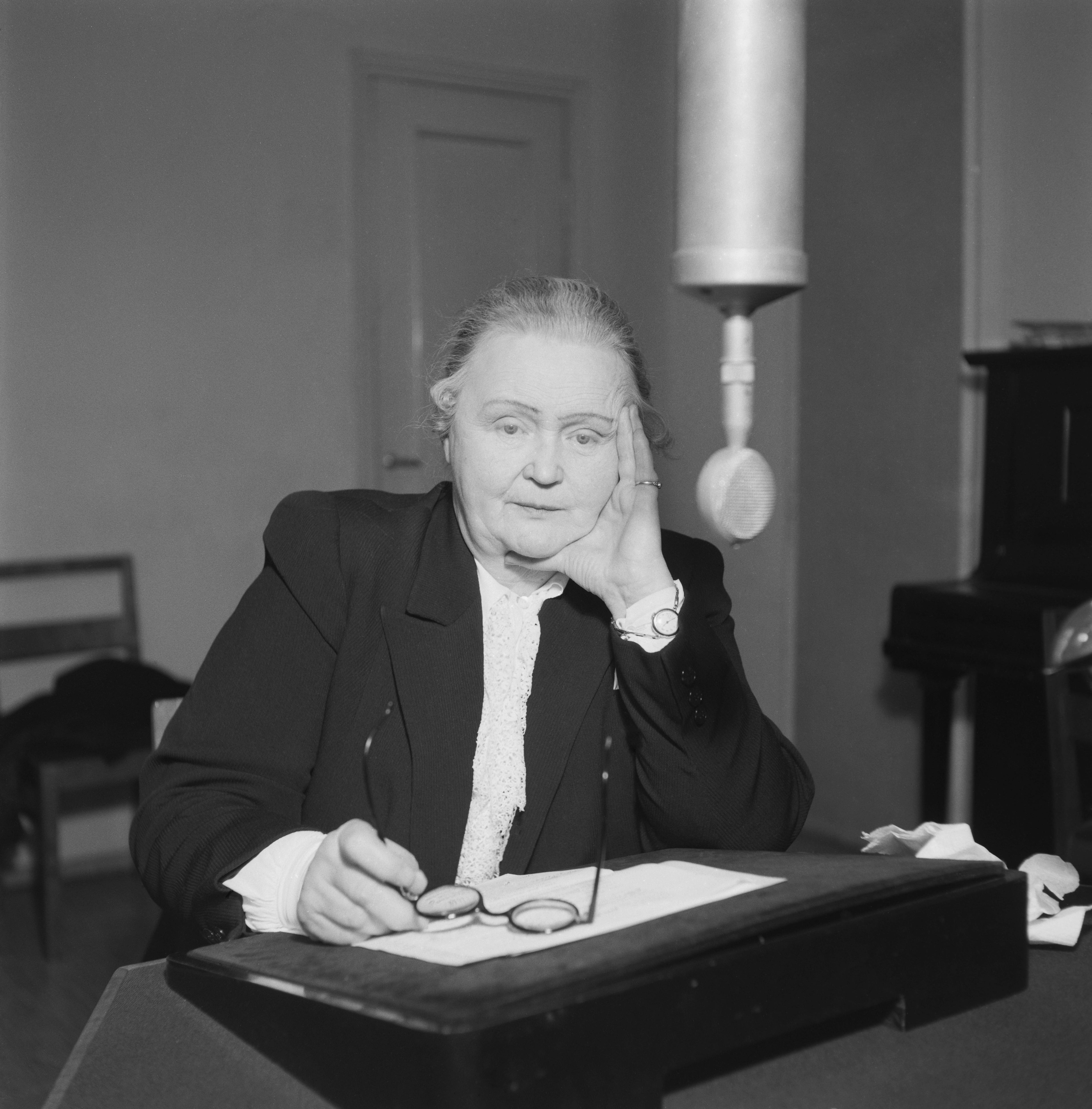 Hella Wuolijoki toimi Yleisradion pääjohtajana vuosina 1944 - 1949. Tiedätkö jotain tästä kuvasta? Jätä kommentti tai ota yhteyttä sähköpostitse: Tutustu Ylen arkistosisältöihin: Fler skatter från Yles arkiv: More about Yle, the Finnish Broadcasting Company